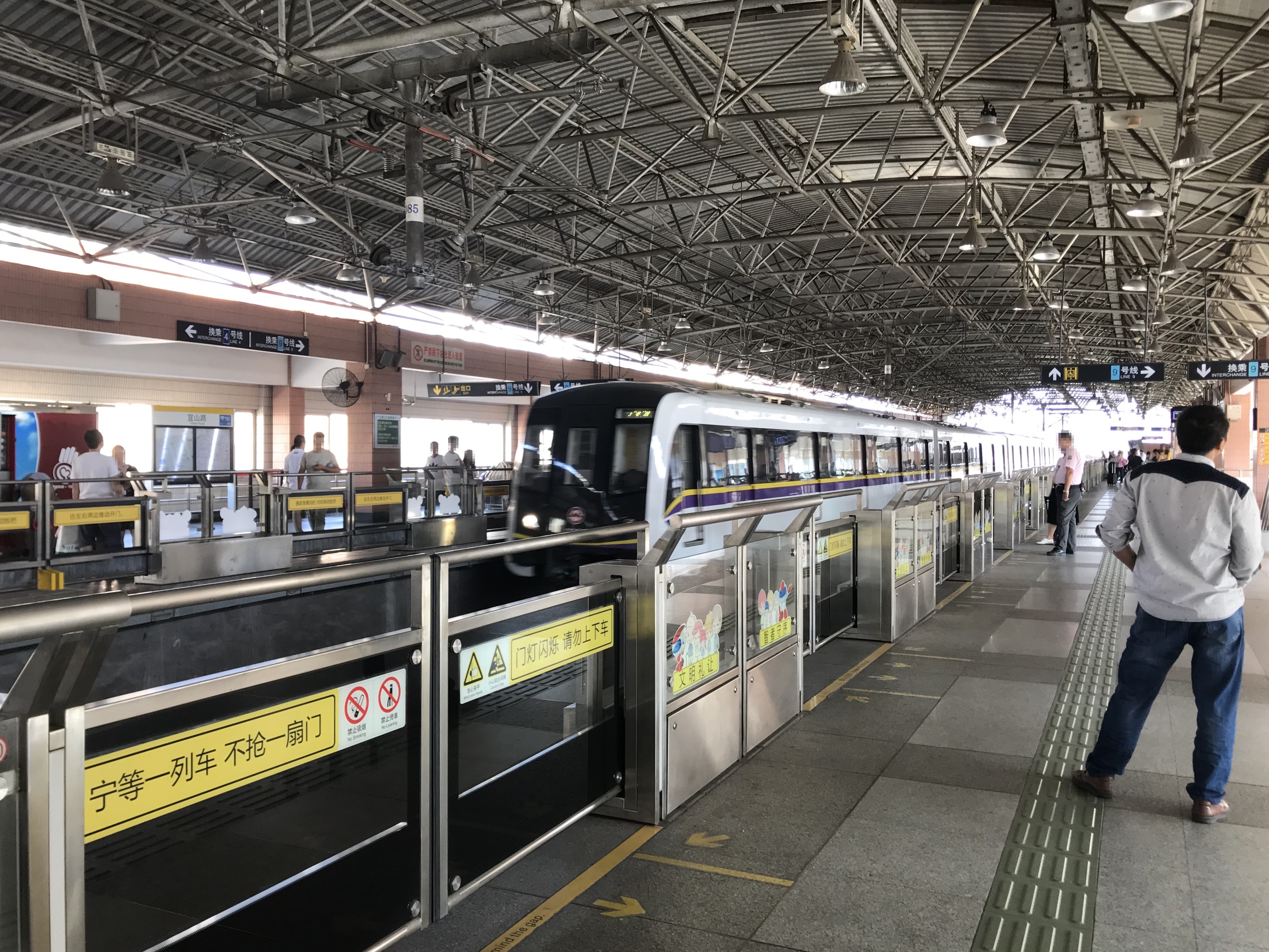 宜山路駅(上海地下鉄3号線)のホーム